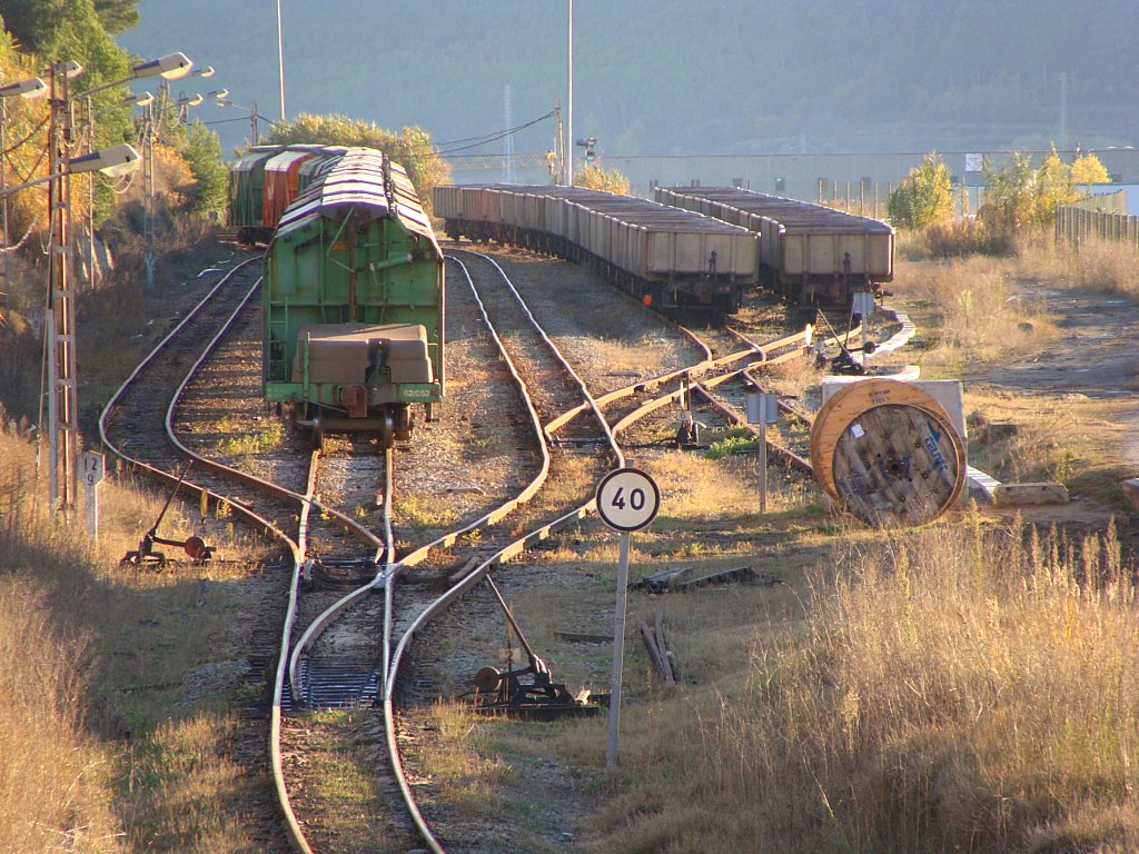 Aspecte de la classificació de Súria. Aspecto de la clasificación de Súria.